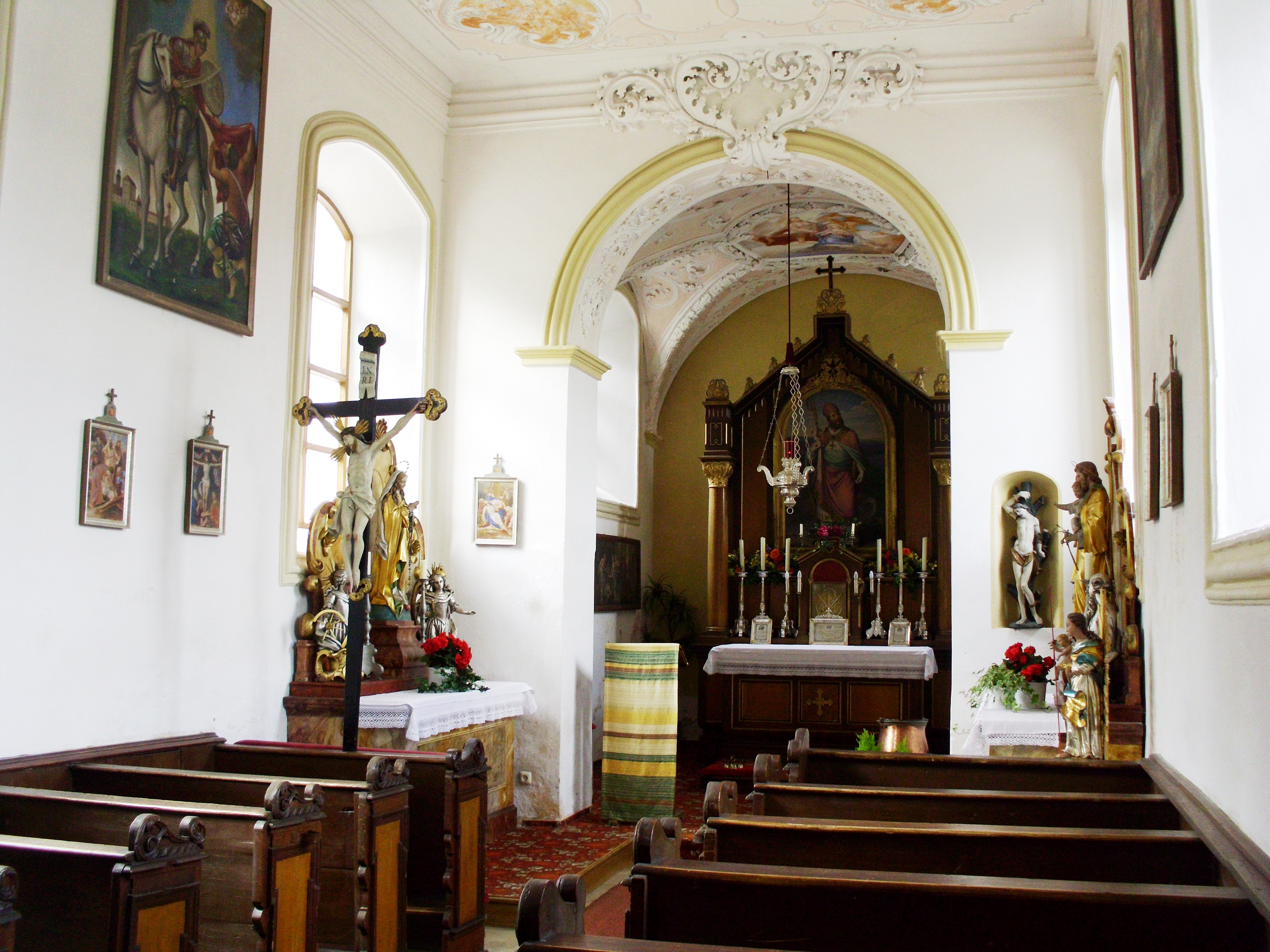 Ellenbrunn (Markt Rennertshofen) im Landkreis Neuburg-Schrobenhausen, Inneres der Ortskirche St. Martin